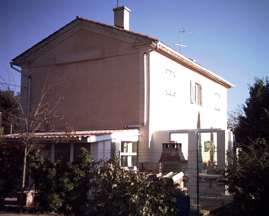 Le bâtiment voyageurs de l'ancienne gare de Valdonne (commune de Peypin), sur la ligne d'Aubagne à Fuveau-la Barque. Aujourd'hui propriété privée. L'horloge est toujours présente.